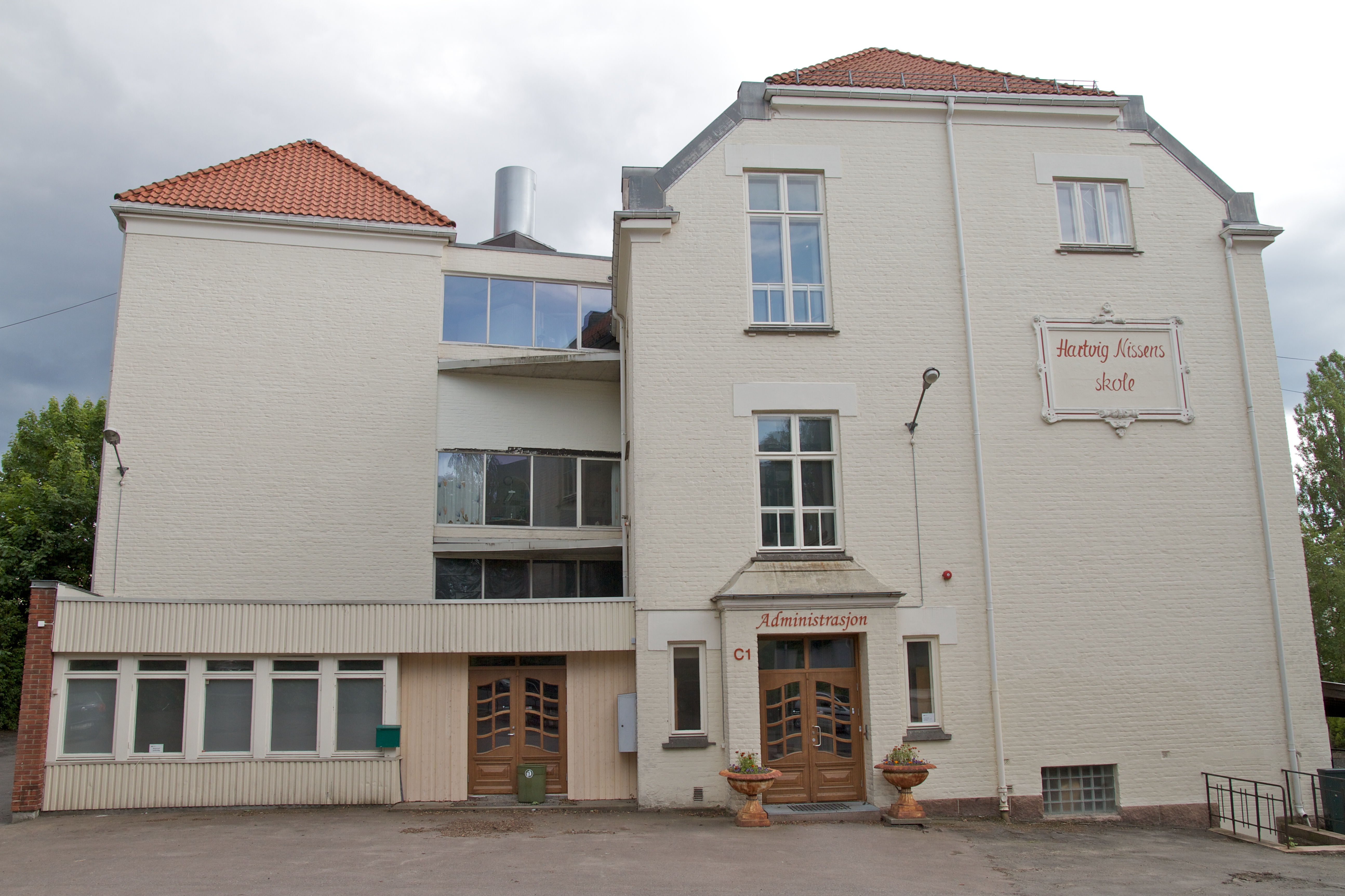 President Harbitz' gate 3 på Frogner i Oslo.